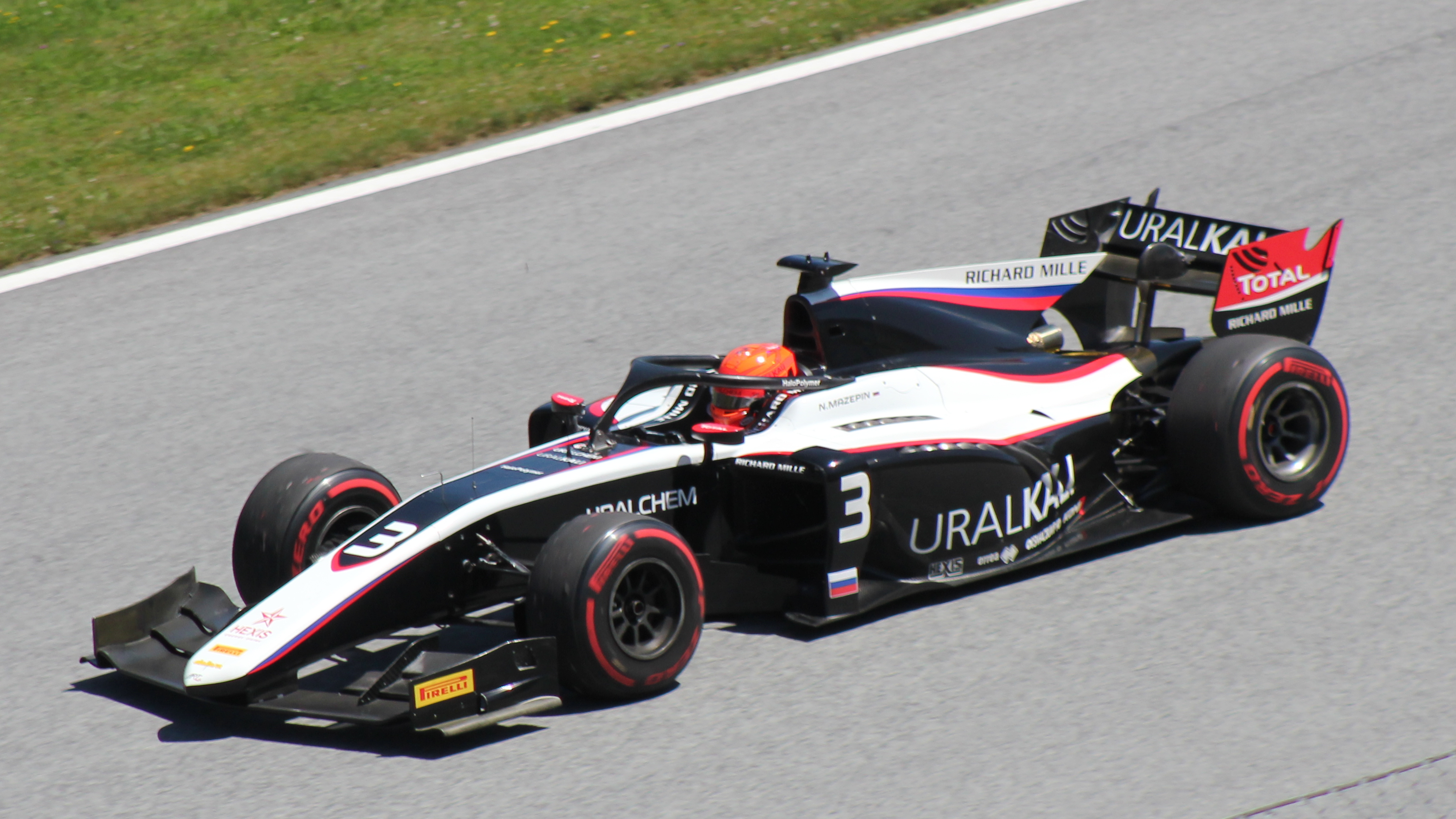 Mazepin beim Rennwochenende in Österreich 2019